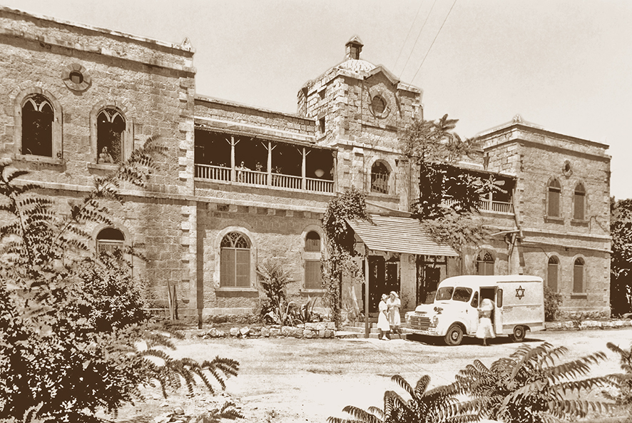 בניין he:בית הספר לבנות של המיסיון האנגליקני, בתקופה בו נמצא בו בית החולים הדסה